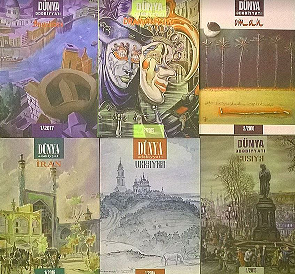 Azərbaycan Bədii Tərcümə və Ədəbi Əlaqələr Mərkəzi